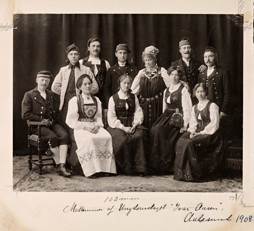 Tittel / Title: Medlemmer af Ungdomslaget "Ivar Aasen", Aalesund 1908 Motiv / Motif: Gruppebilde. Fotografiet har tilhørt Hulda Garborg. Dato / Date: 1908 Fotograf / Photographer: Sigvald Moa (1879-1938) Sted / Place: Ålesund Eier / Owner Institution: Nasjonalbiblioteket / National Library of Norway Lenke / Link: Bildesignatur / Image Number: blds_03746